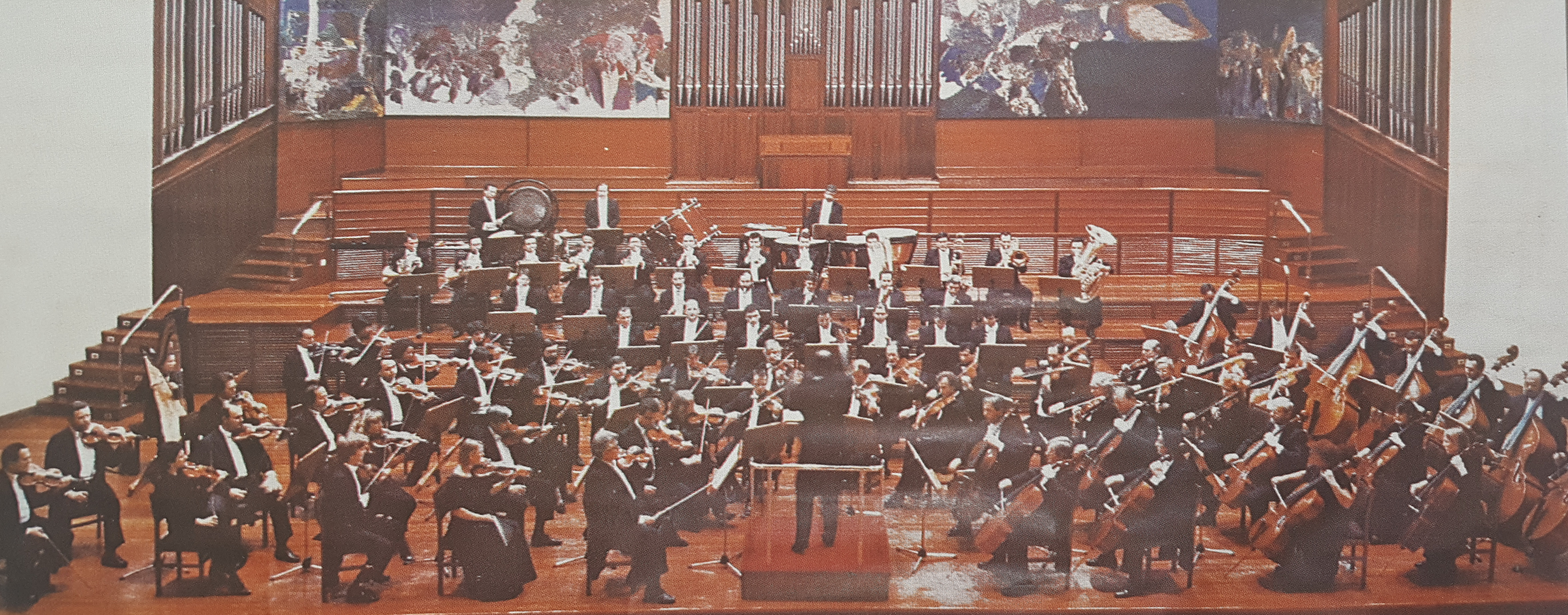 Orquesta Sinfónica de San Sebastián